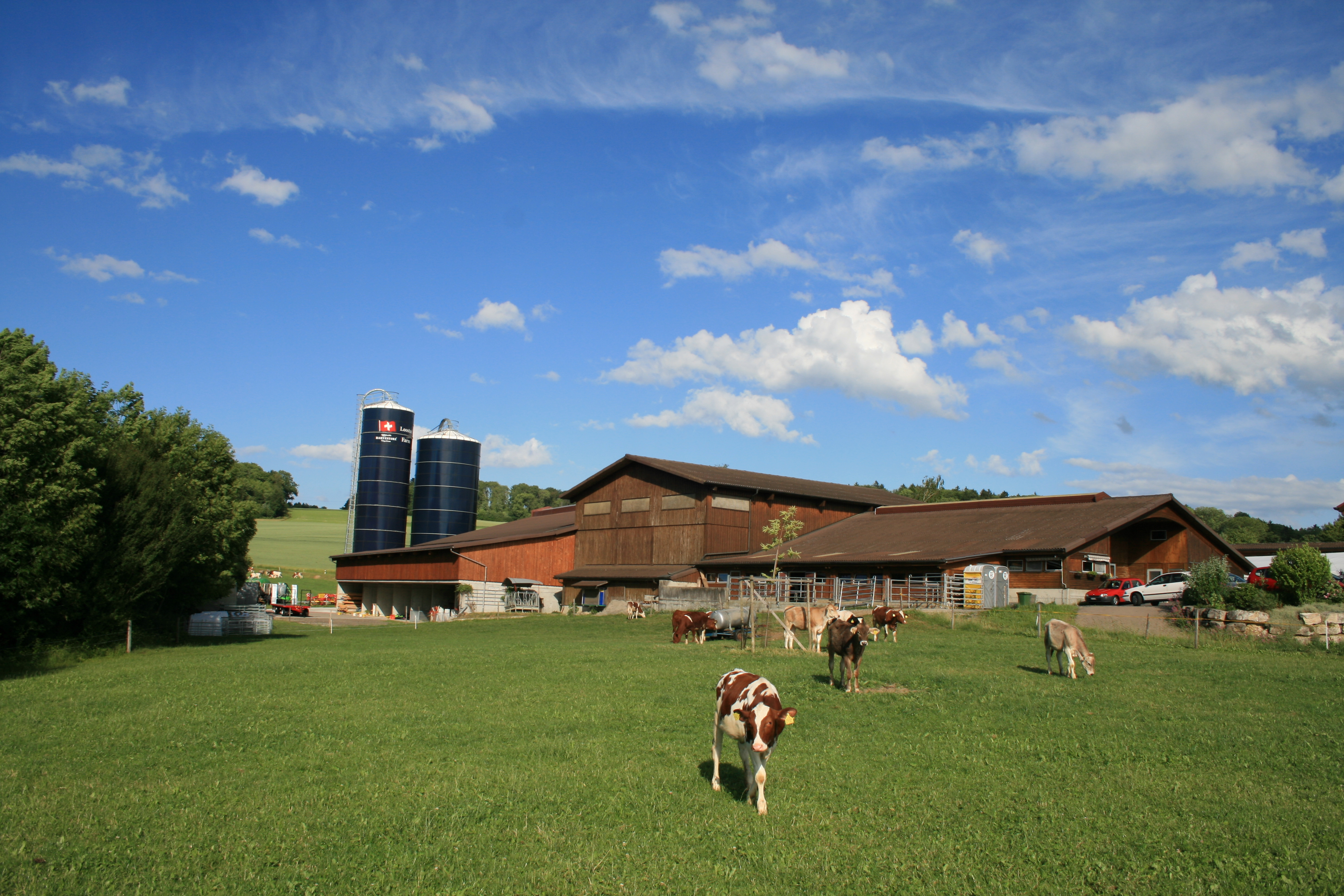 Weiler Loostud, Berikon AG, Schweiz